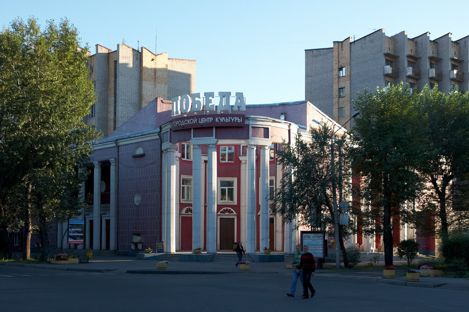 Abakan